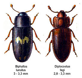 Biphyllidae spec.